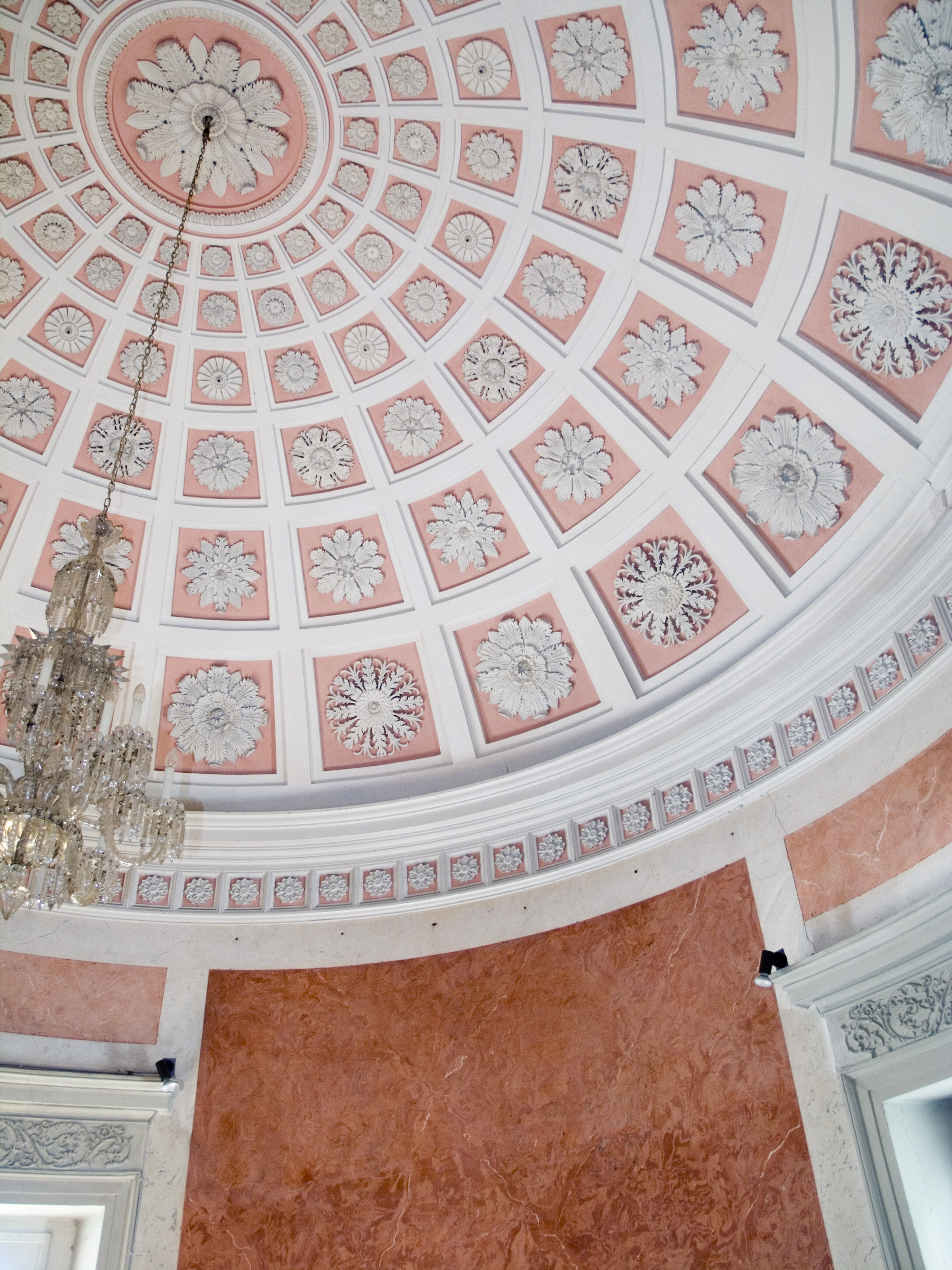 Северный Рейн-Вестфалия, Вупперталь - башня Элизы